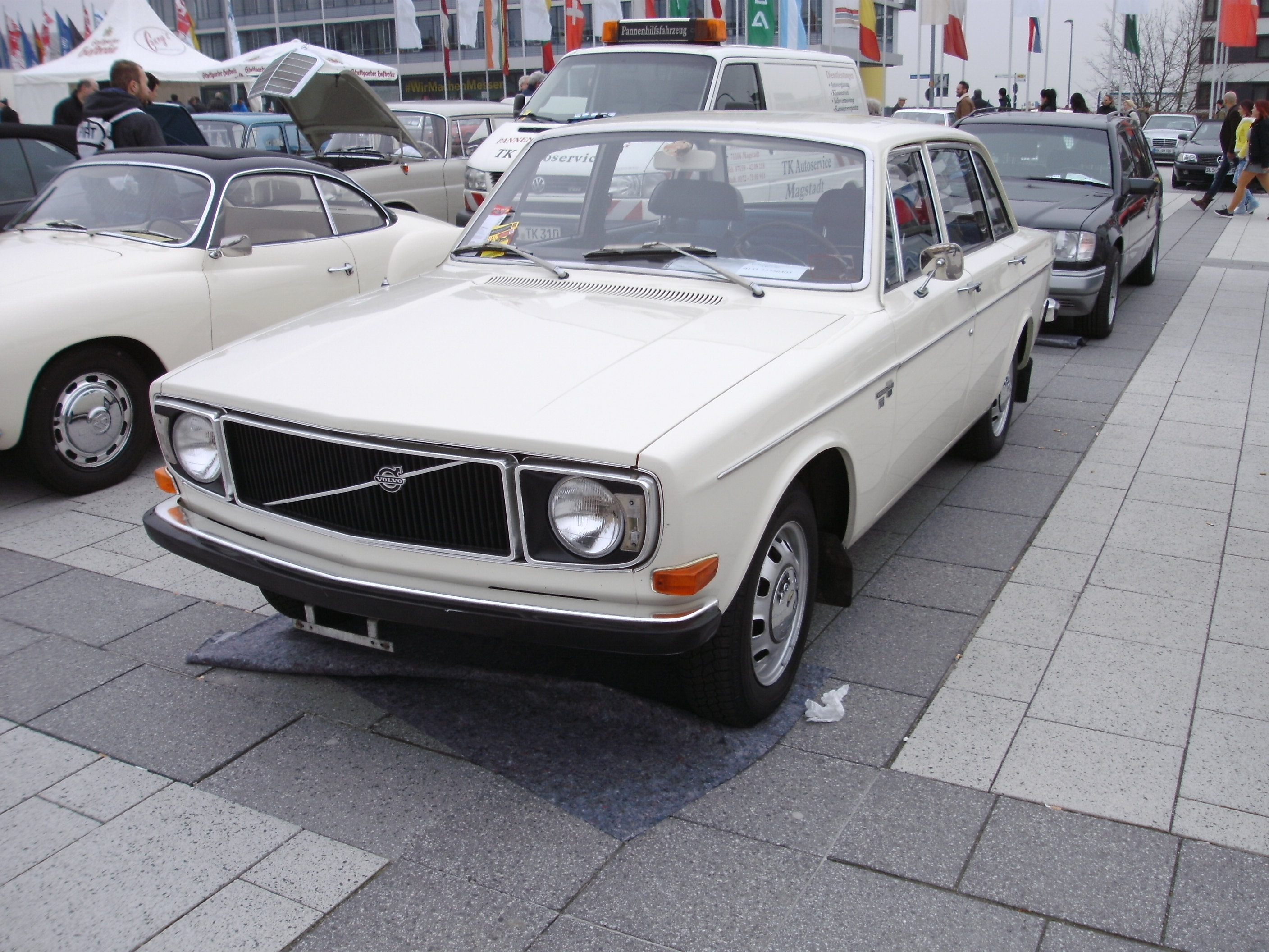 Volvo 144 De Luxe, Baujahr 1971